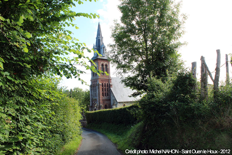 Vue depuis le chemin de l'église